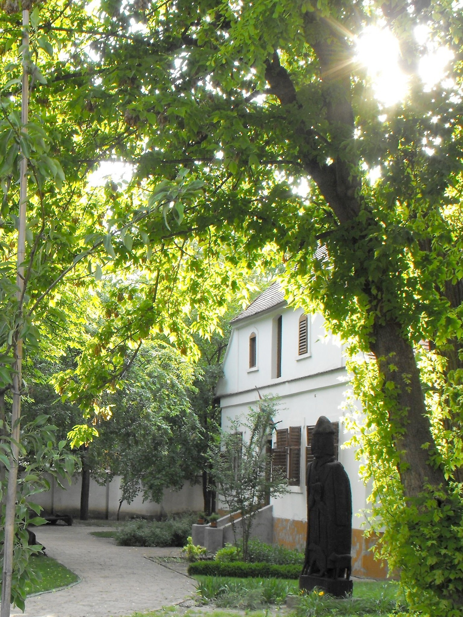 Magyar Naiv Művészek Múzeuma, a műemlék Bánó-házban található, azonosító 2264. Szabadon álló, téglalap alaprajzú, földszintes, meredek, felső csonkakontyolt nyeregtetős épület, újabb tetőtér beépítéssel. A főépület 1746-ban épült, további részeit Nemes Bálthelei Bánó János építtette 1809-ben. A 19. század folyamán többször bővítve. 1976-tól múzeum. - Bács-Kiskun m., Kecskemét, (Petőfi u. 11.), Gáspár András utca 11 This is a photo of a monument in Hungary. Identifier: 2264